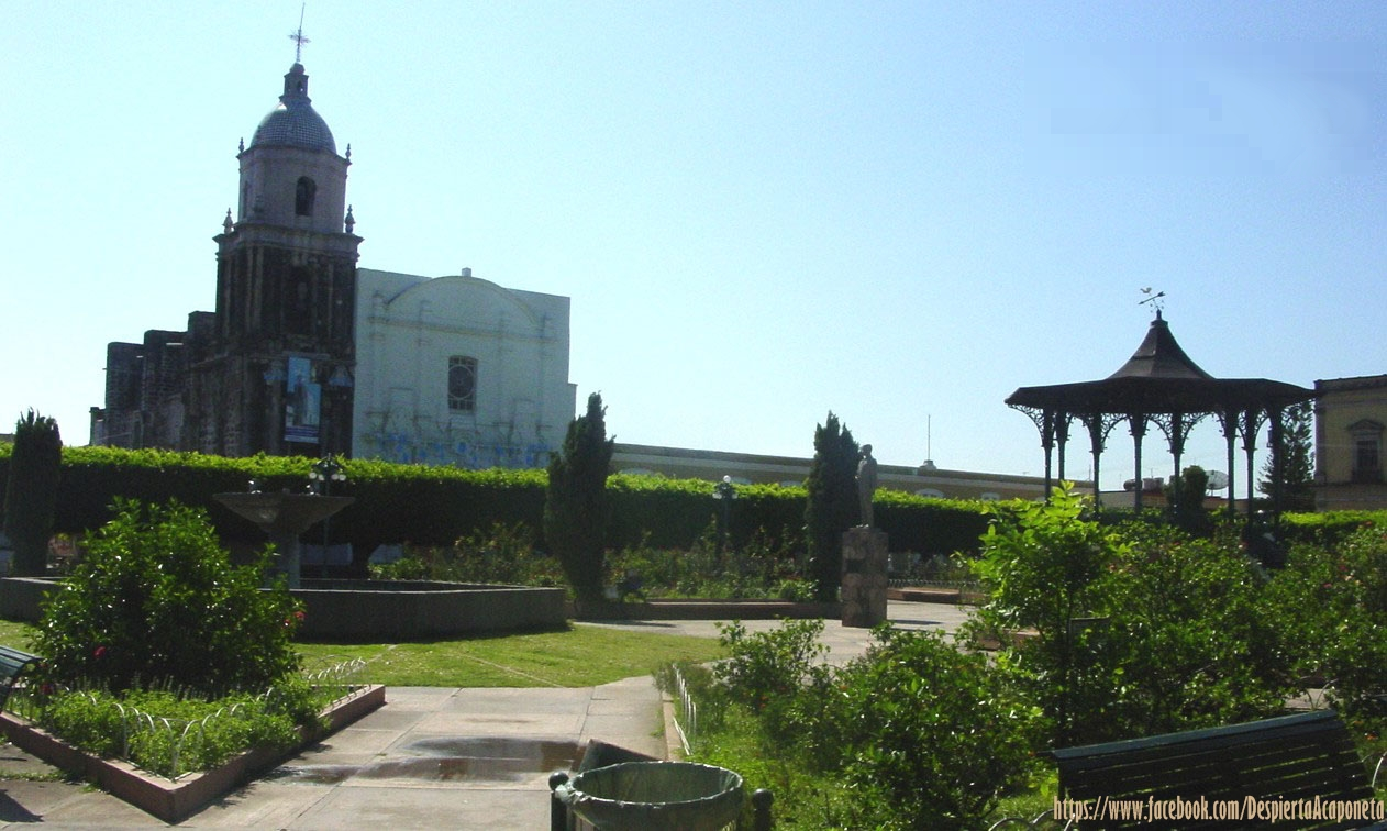 Esta plaza fue destruida en el 2008, por el entonces presidente municipal Efrain Arellano Núñez.